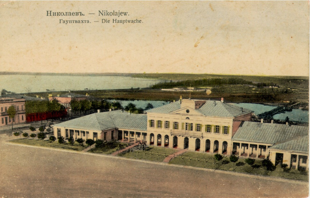 „Nikolajew. Die Hauptwache“